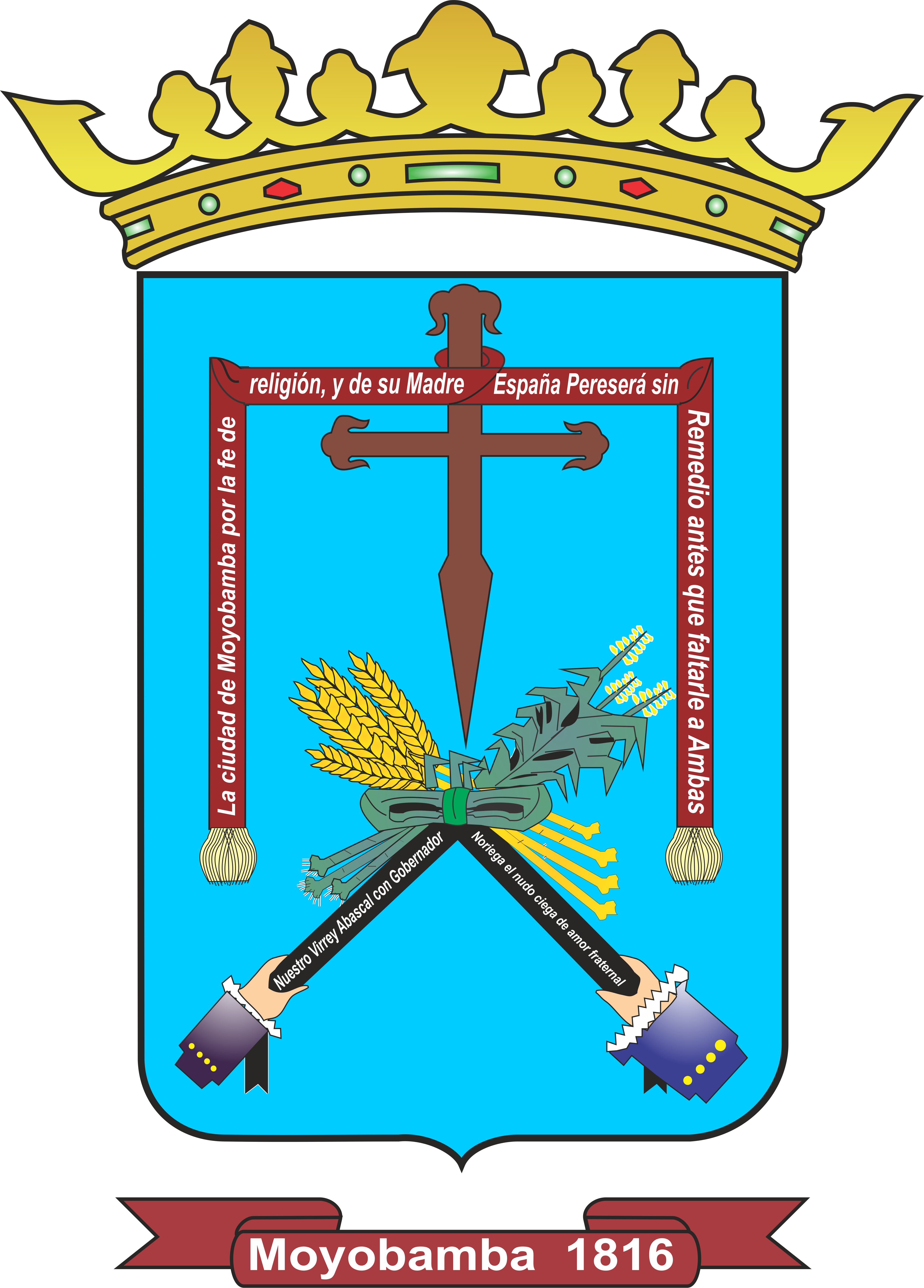 Escudo de la ciudad de Moyobamba